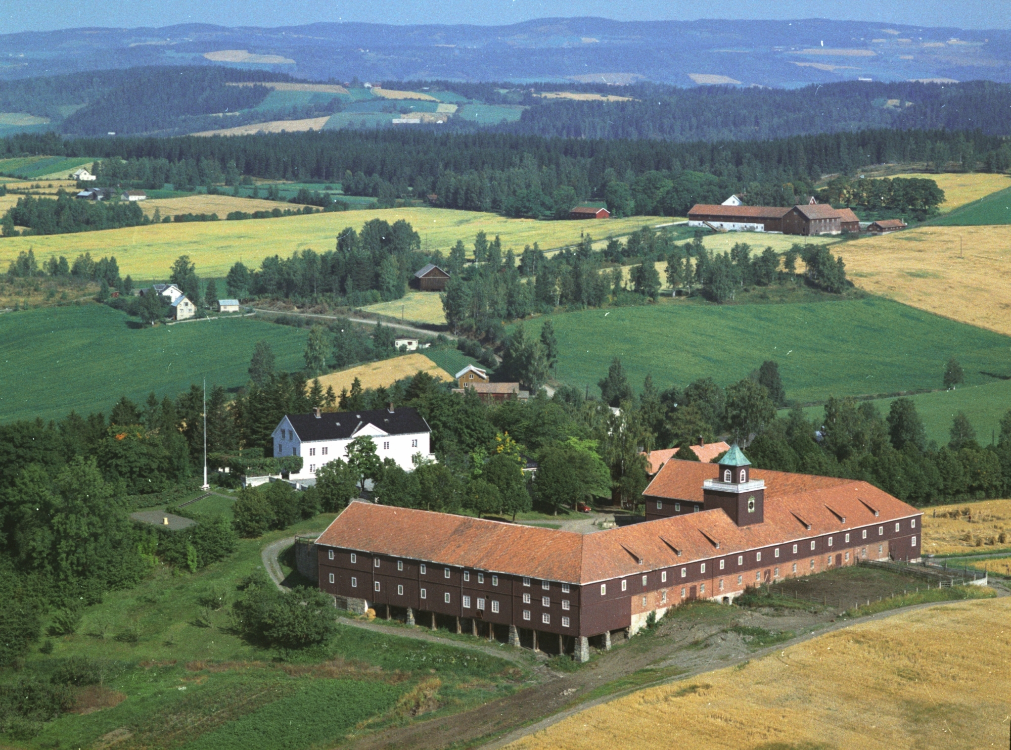 Skredshol gård i Ringsaker, 1961.